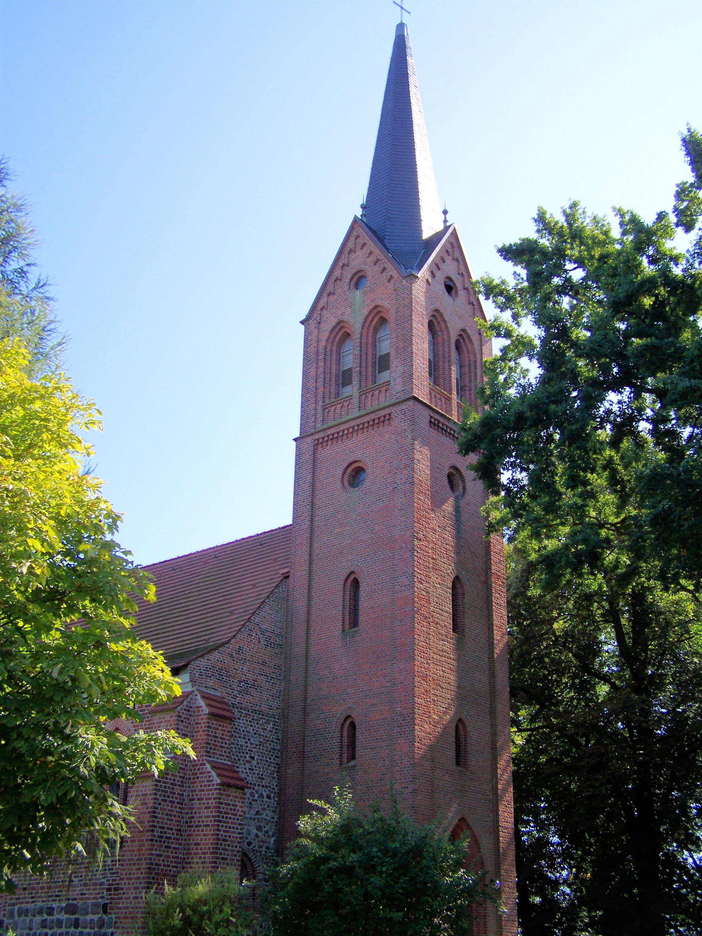 Krummin, Kirche St. Michael (2008-08-31)